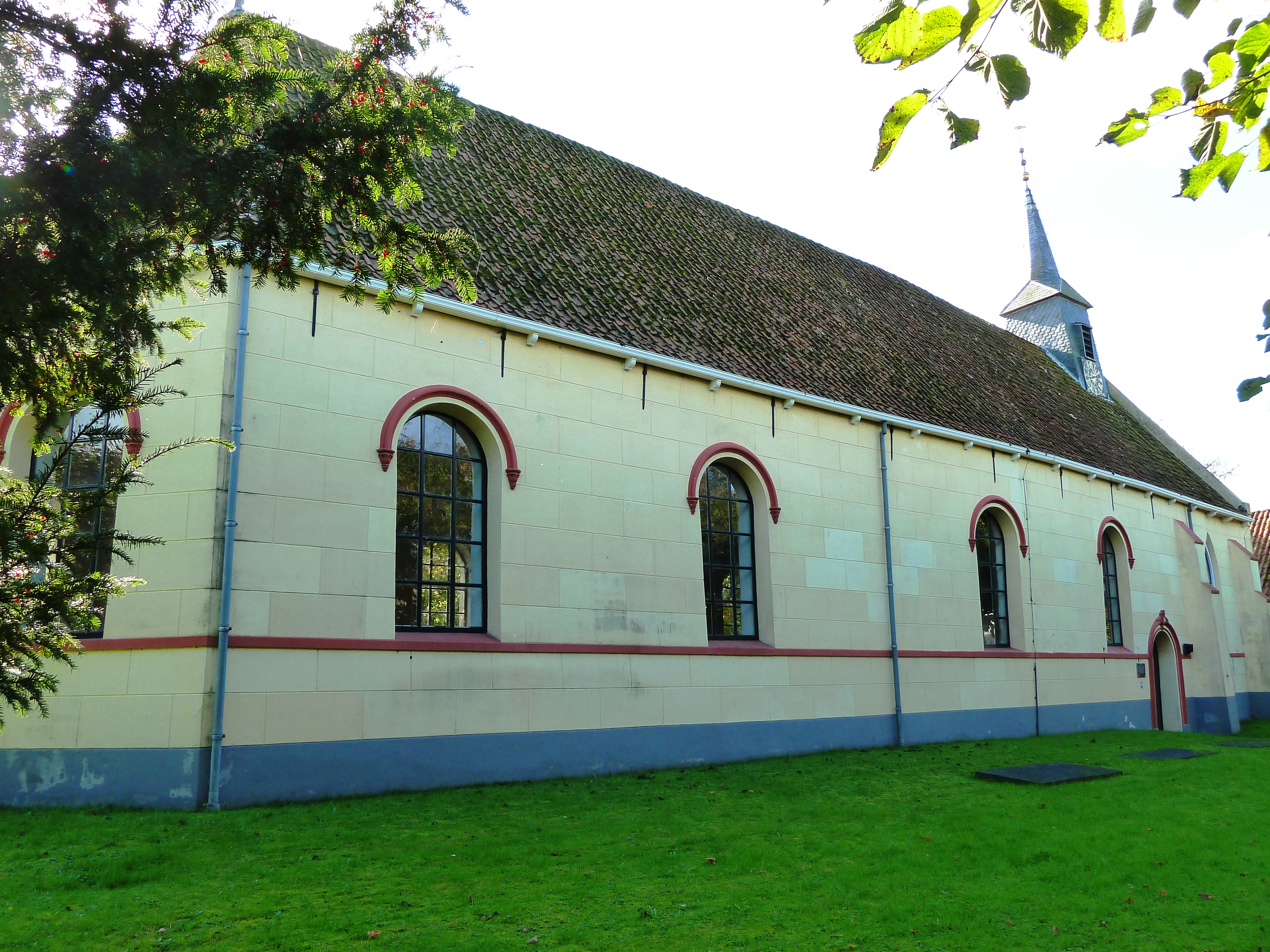 Hervormde kerk van Visvliet.